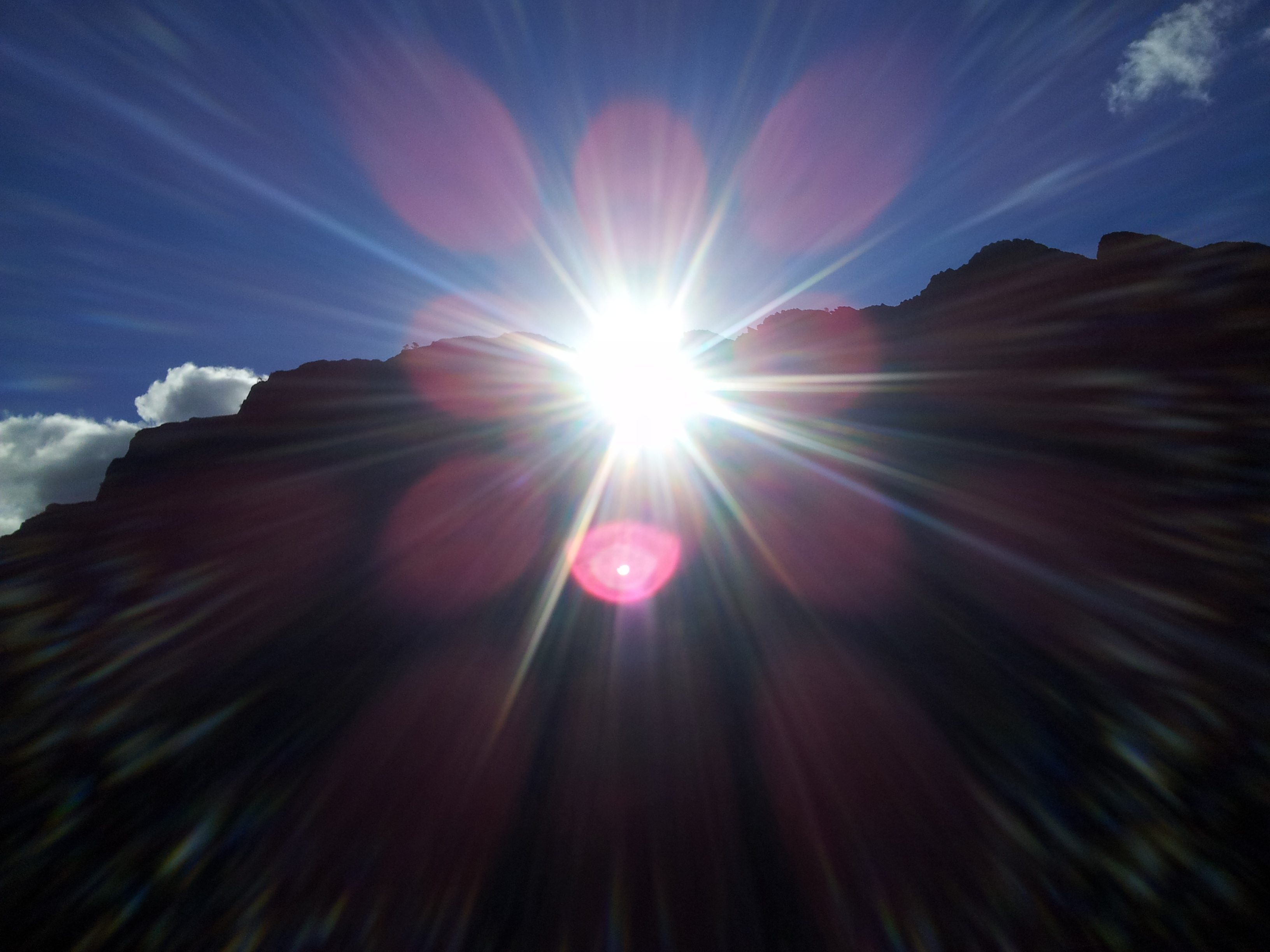 Orto solar sobre una degollada de Amurga. Se trata de un marcador equinoccial.